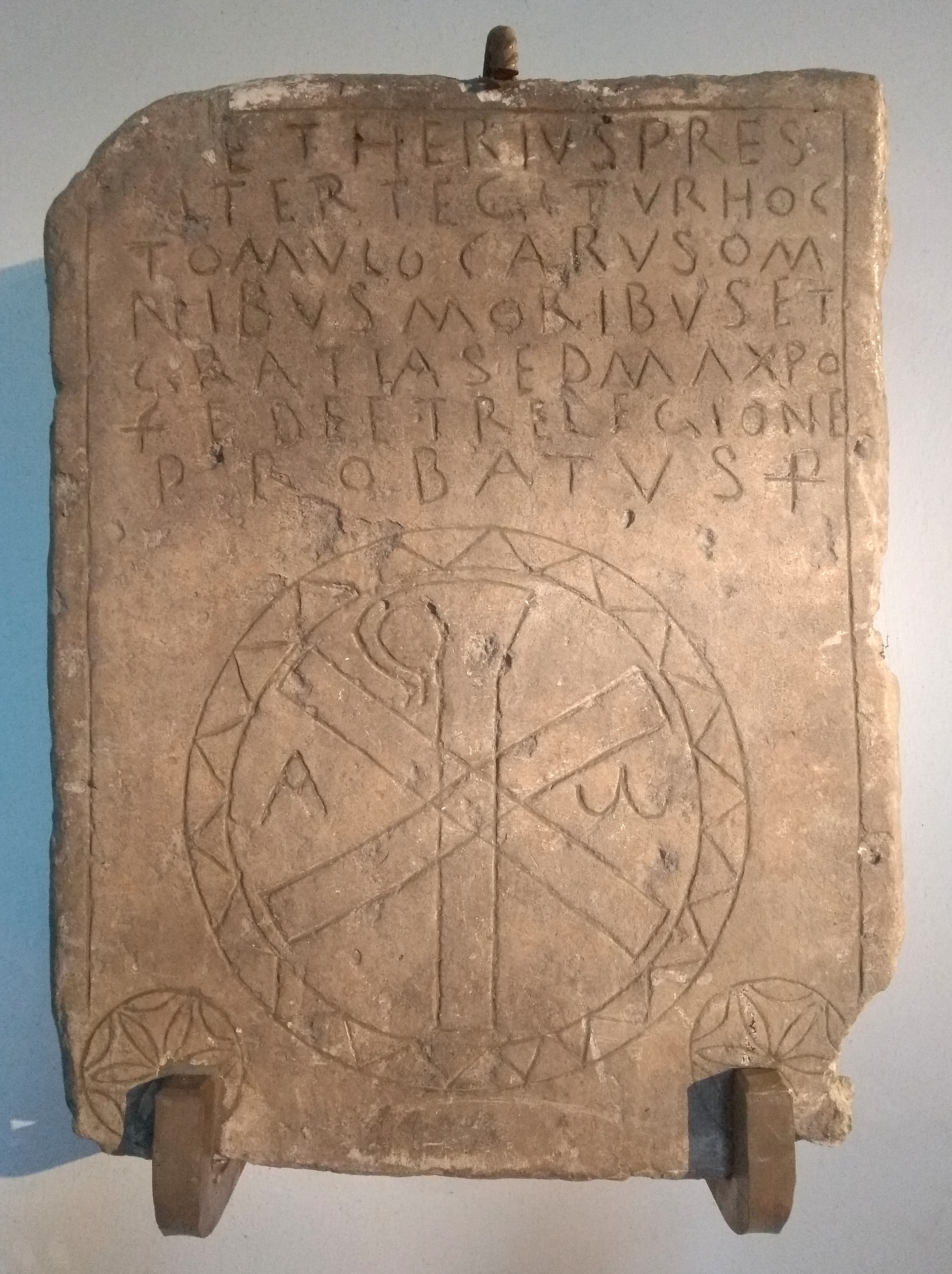 Aetherius-Grabstein in der Bingener Basilika St. Martin